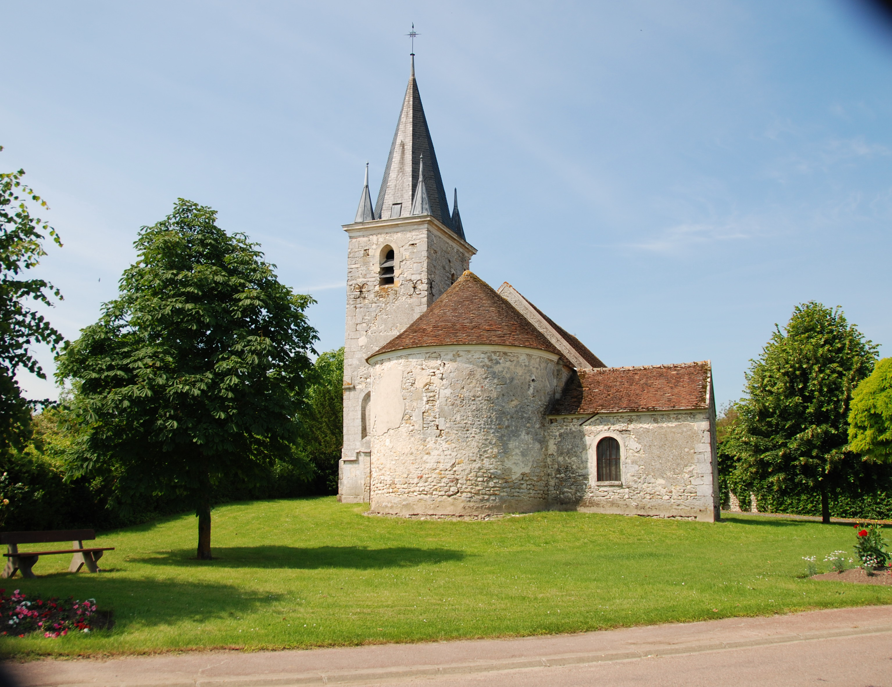 Place de l'église à Jacqueville. (commune d'Amponville 77).